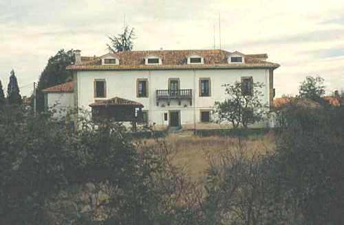 Fotografía del Palacio de Miraflores en Noreña